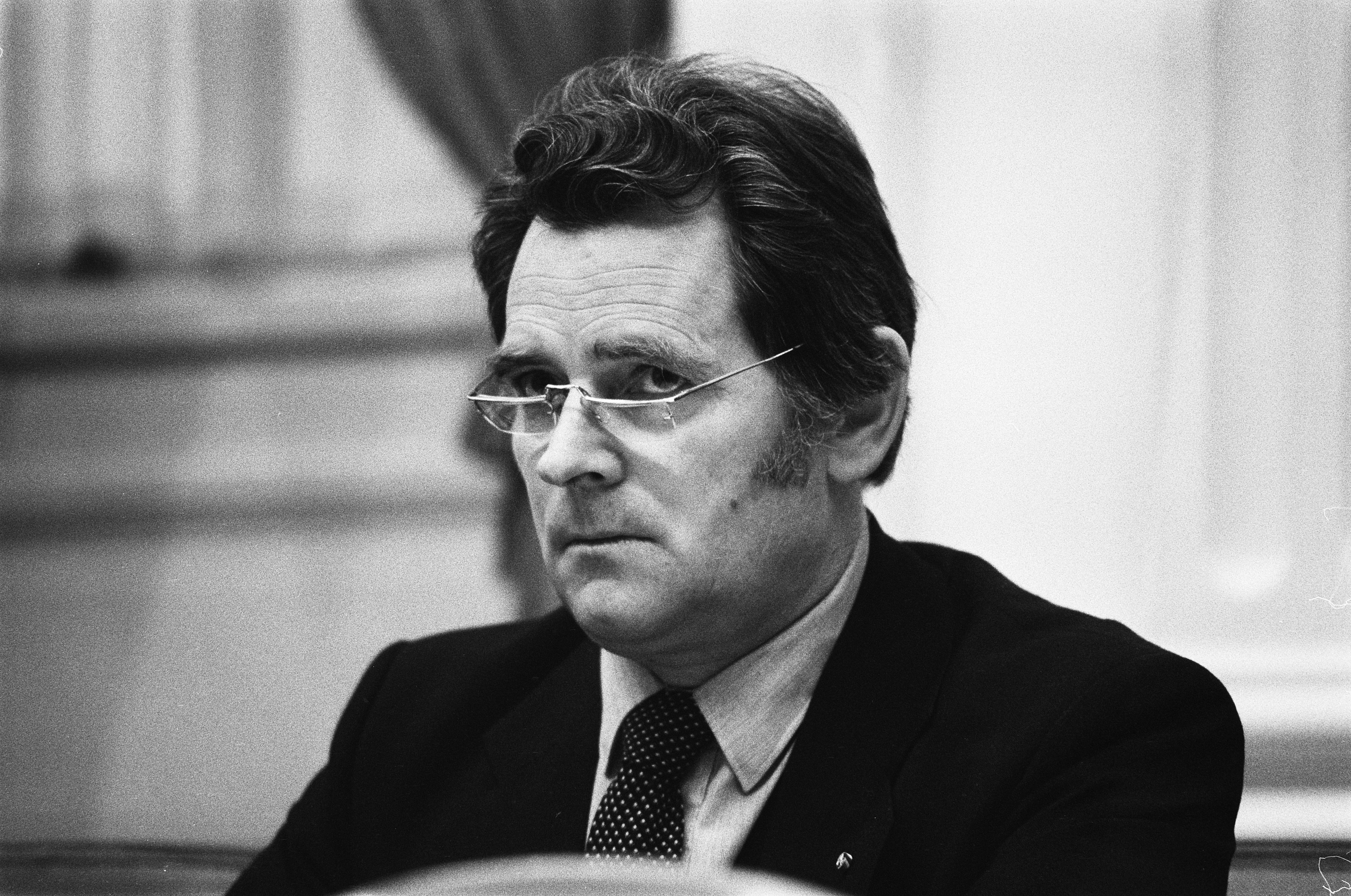 Collectie / Archief : Fotocollectie Anefo Reportage / Serie : Tweede Kamer bespreekt wijziging algemene Kinderbijslagwet Beschrijving : Staatssecretaris van Sociale Zaken Louw de Graaf Datum : 28 november 1979 Locatie : Den Haag, Zuid-Holland Trefwoorden : kinderbijslag, politiek, portretten, sociale voorzieningen, staatssecretarissen Persoonsnaam : Graaf, Louw de Fotograaf : Rob Croes Auteursrechthebbende : Nationaal Archief Materiaalsoort : Negatief (zwart/wit) Nummer archiefinventaris : bekijk toegang 2.24.01.05 Bestanddeelnummer : 930-5633